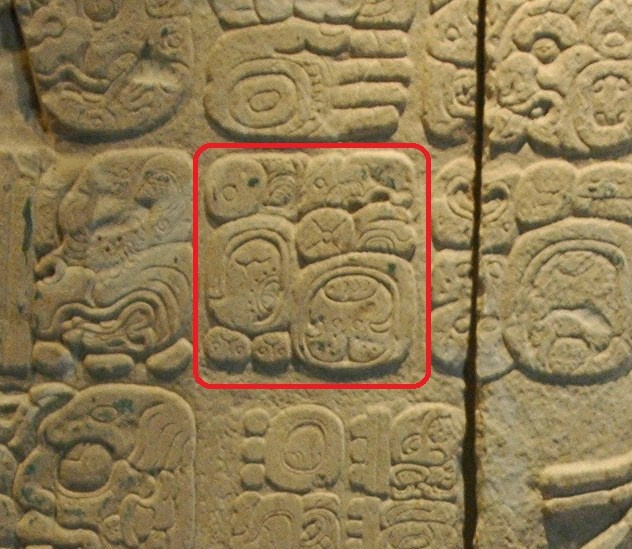 Glifo del ajaw maya Ahkal Mo' Naab I en el tablero del Templo XVII de Palenque.